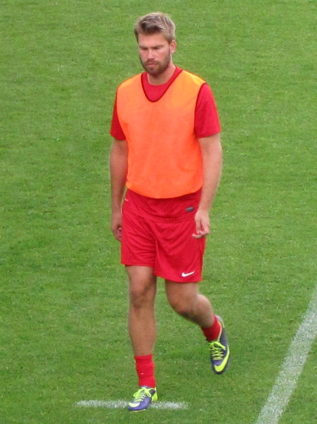 Jukka Santala, suomalainen jalkapalloilija PK-35 Vantaan joukkueessa kaudella 2014.